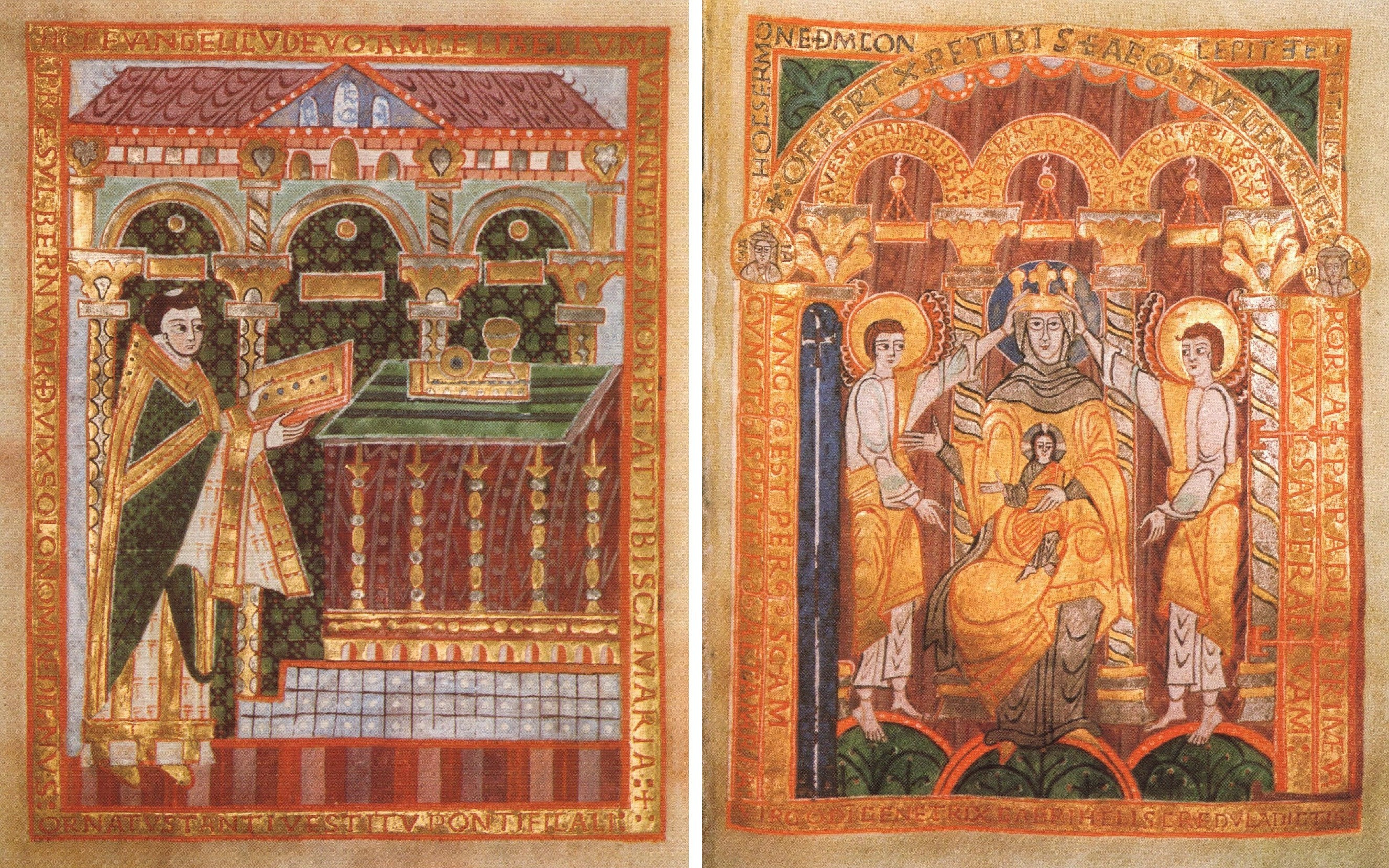 Kostbares Evangeliar Bischof Bernwards, doppelseitiges Widmungsbild: Bernward legt das Evangeliar auf den Altar (links); Maria, Patronin des Doms, als Siegbringende Gottesmutter (rechts)